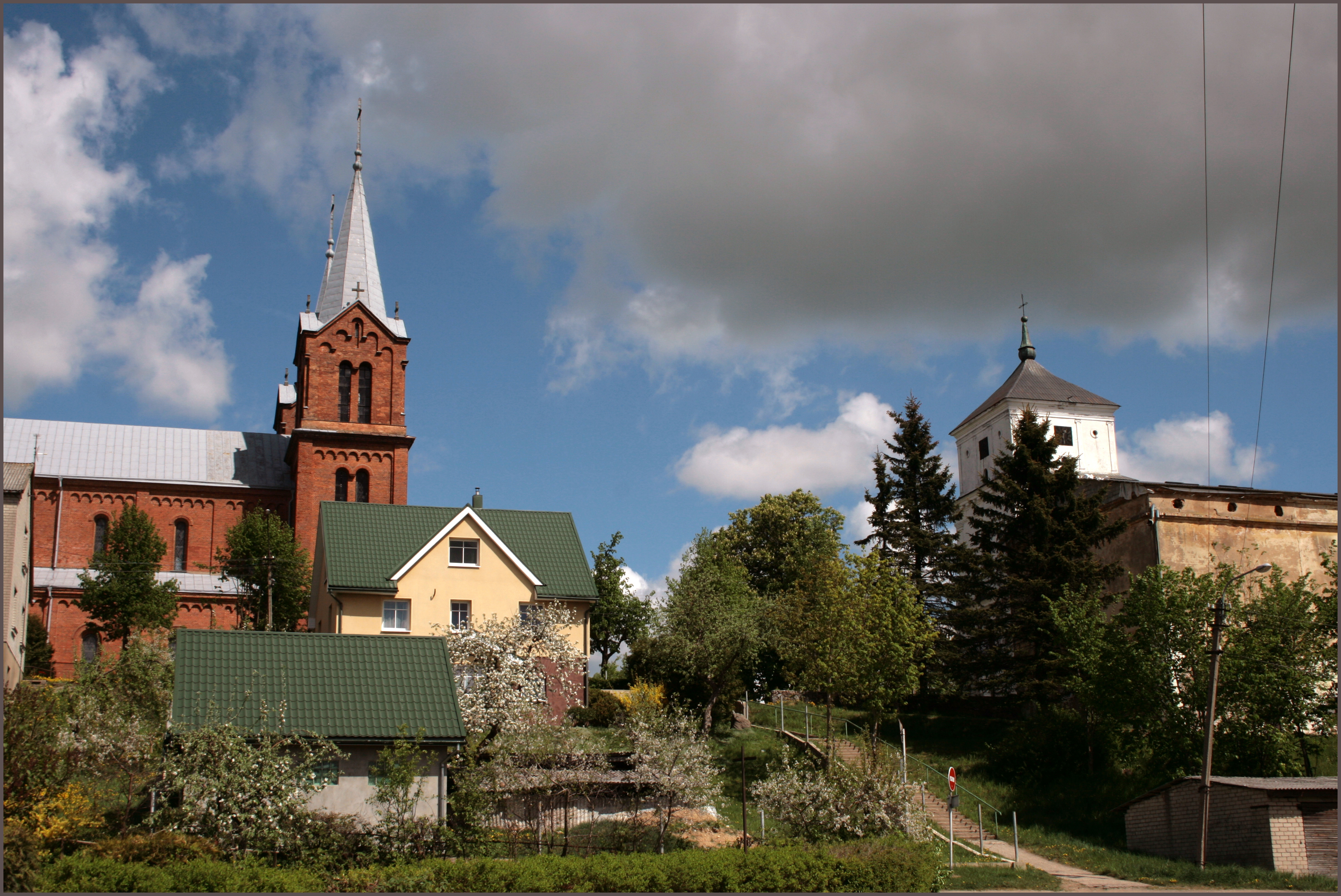 Pluņģe